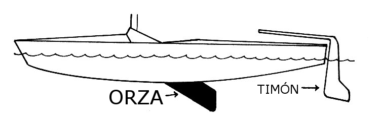 Dibujo de una orza, segun centerboard